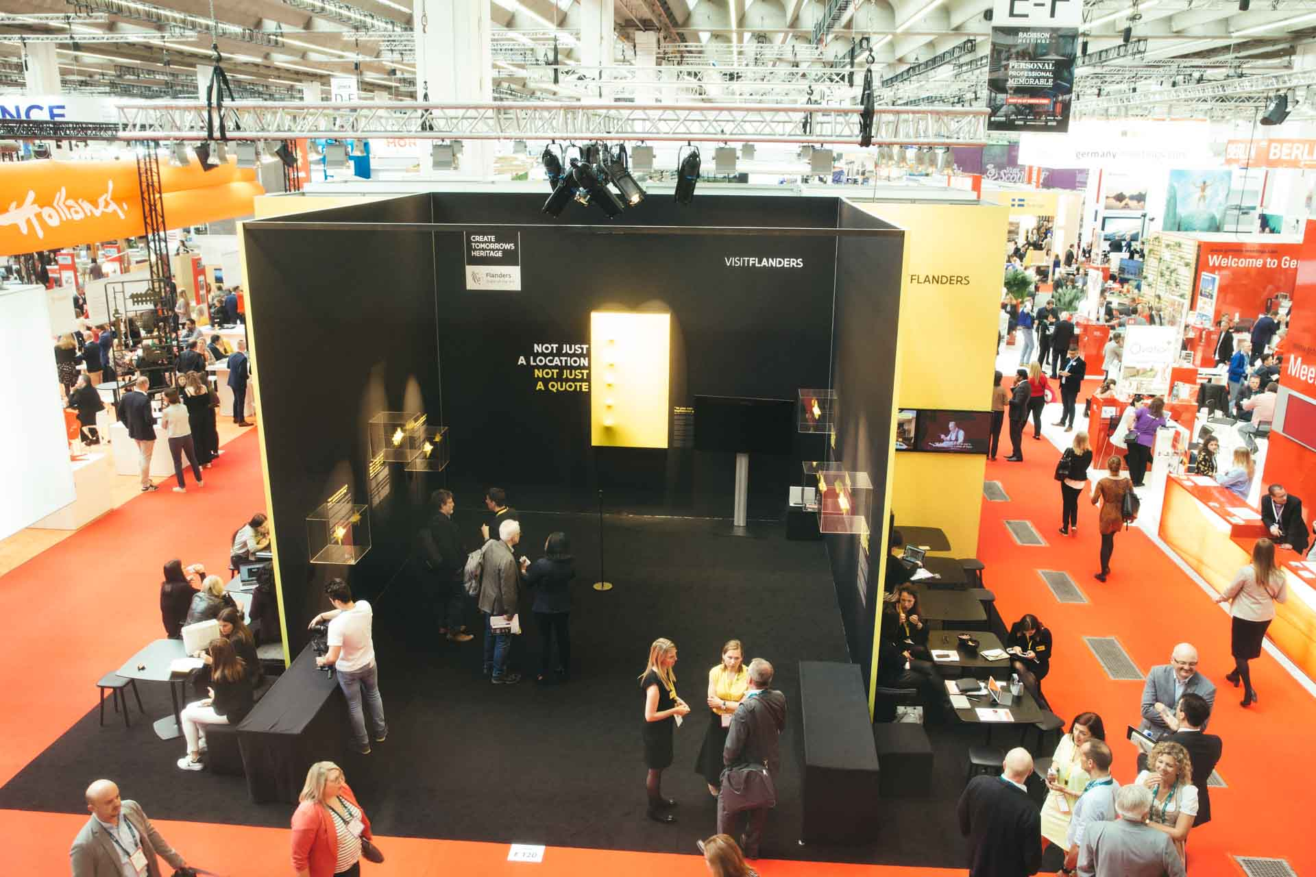 Van 21 tot en met 23 mei 2019 was het VISITFLANDERS Convention Bureau aanwezig op IMEX in Frankfurt, één van de belangrijkste meetingbeurzen ter wereld. Samen met 10 partners uit Vlaanderen en Brussel lanceerden onze meetingexperten er de campagne ‘Create Tomorrow’s Heritage’. Met dit nieuwe merk zetten we Vlaanderen neer als een bestemming die internationale congresdeelnemers inspireert.